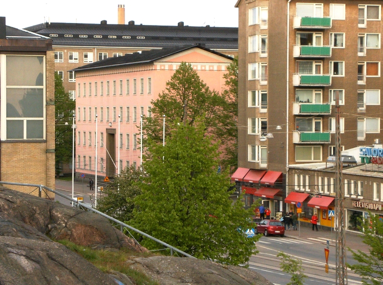 Helsinginkatu, Helsinki